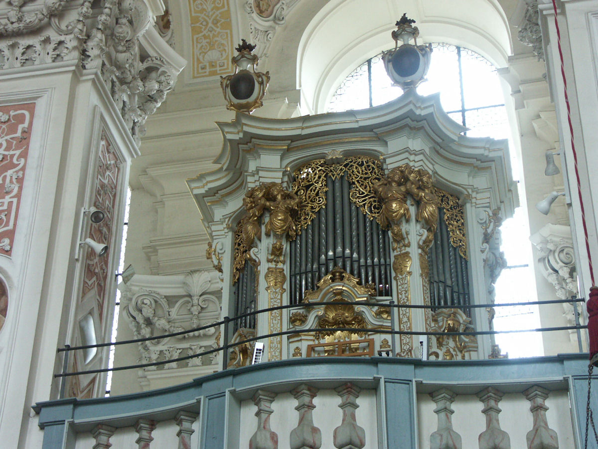 Schöntal Abbey, Schöntal, Germany